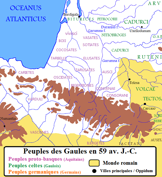 Les peuples proto-basques en 59 av. J.-C.